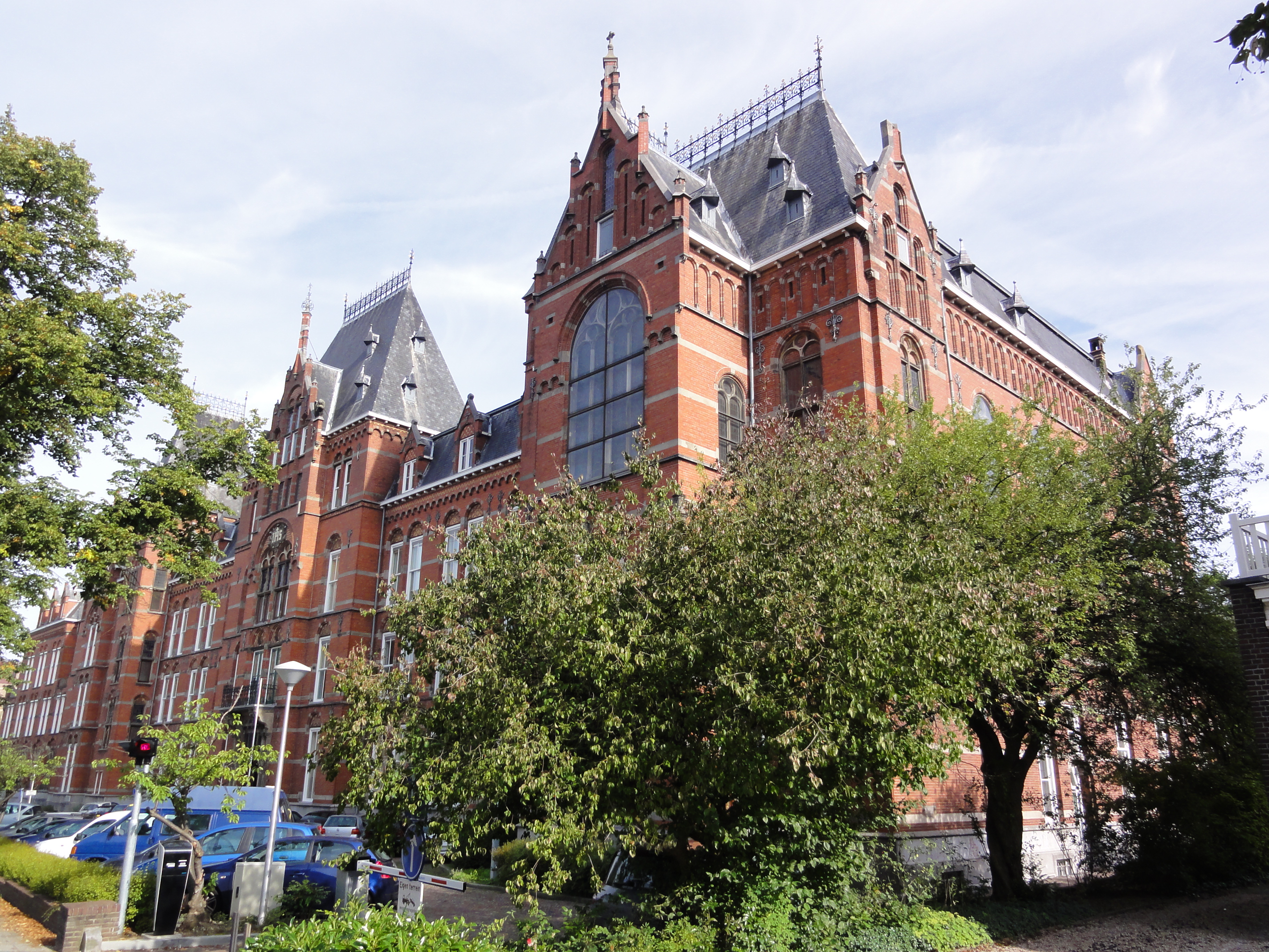 Nijmegen Rijksmonument 46805 voormalig Canisiuscollege Berg en Dalseweg